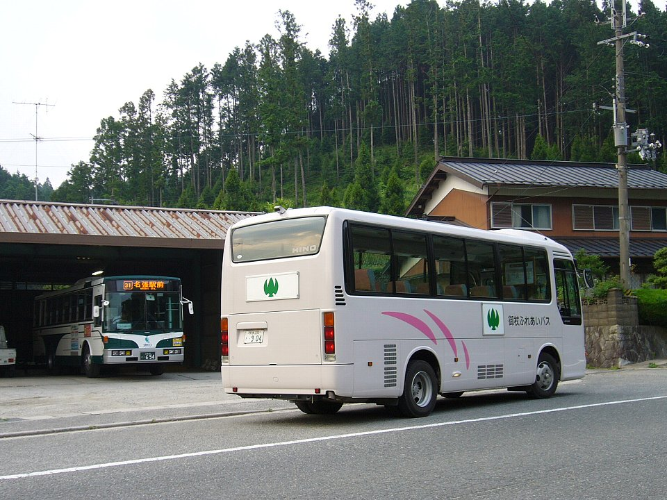 御杖ふれあいバス 奈良県御杖村 敷津バス停付近にて 奥は三重交通バス